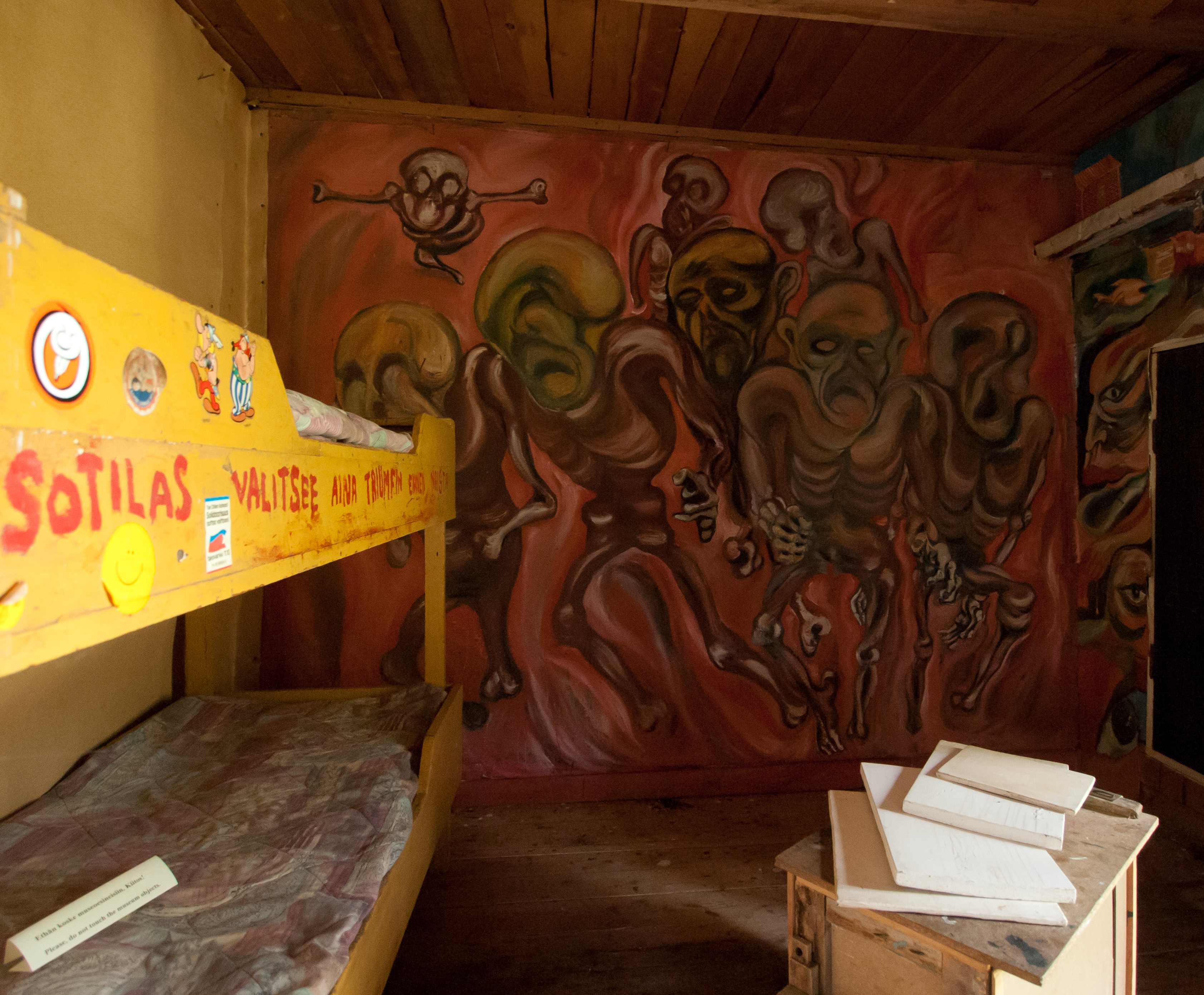 Kalervo Palsa Museum, Getsemane, the Artist's Studio